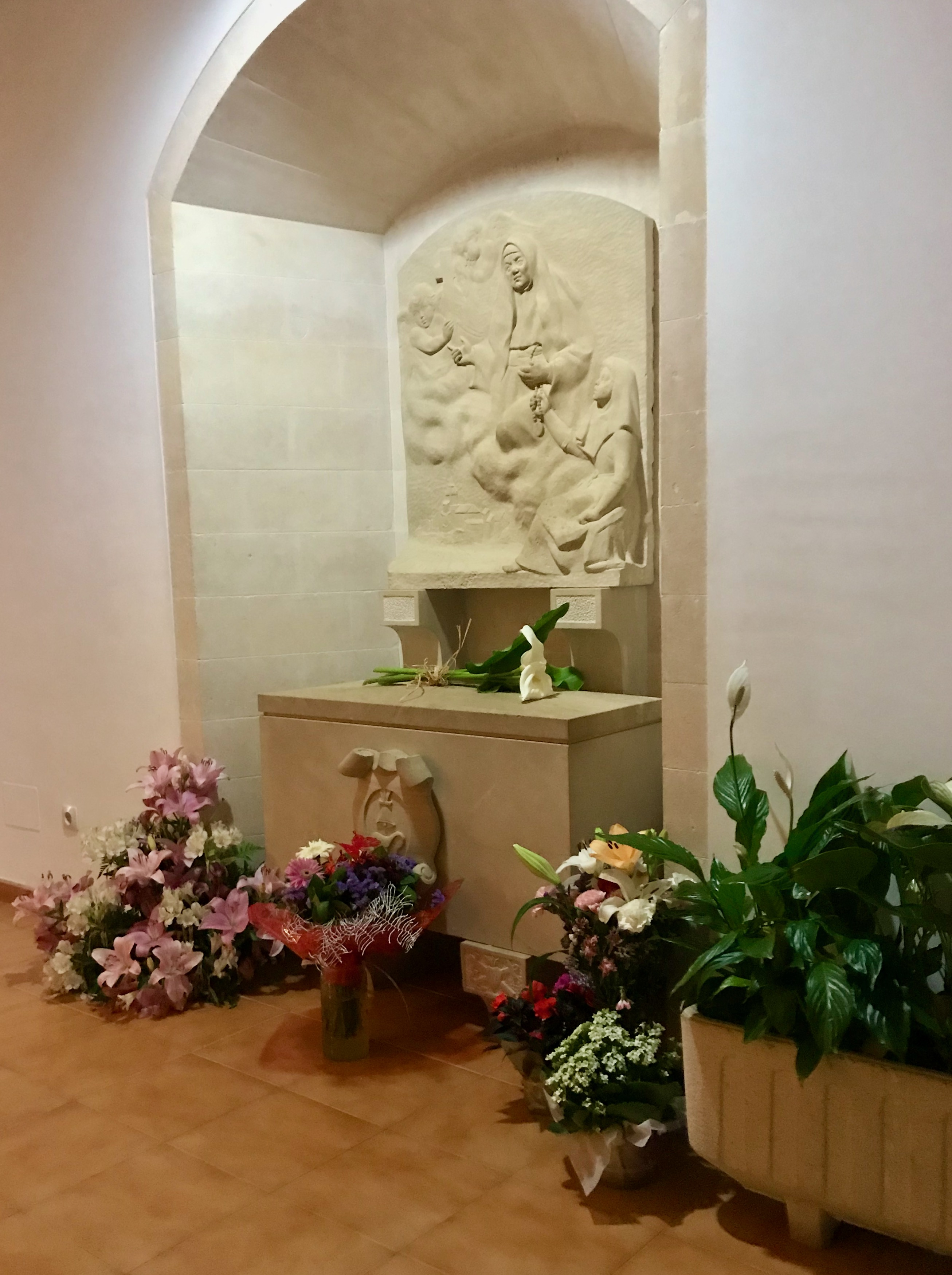 Urna funerària amb les restes òssies de Francinaina Cirer i Carbonell, que són objecte de veneració per nombrosos fidels catòlics que visiten a diari la capella a on està ubicada al municipi de Sencelles.